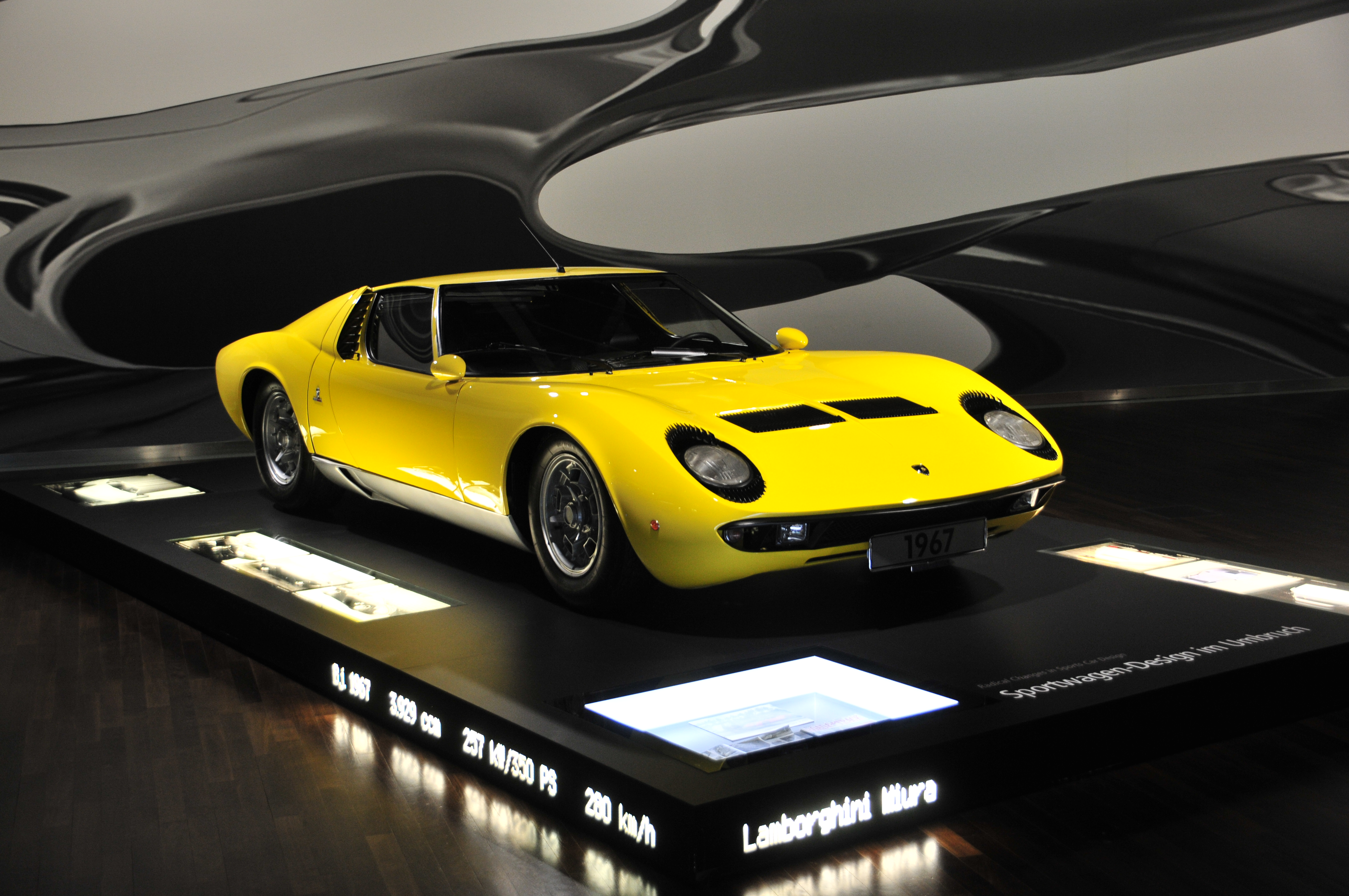 Fahrzeug in der Autostadt Wolfsburg